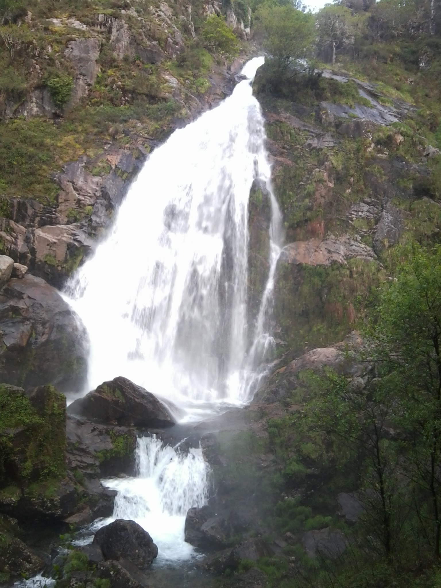 Cascada del río Belelle